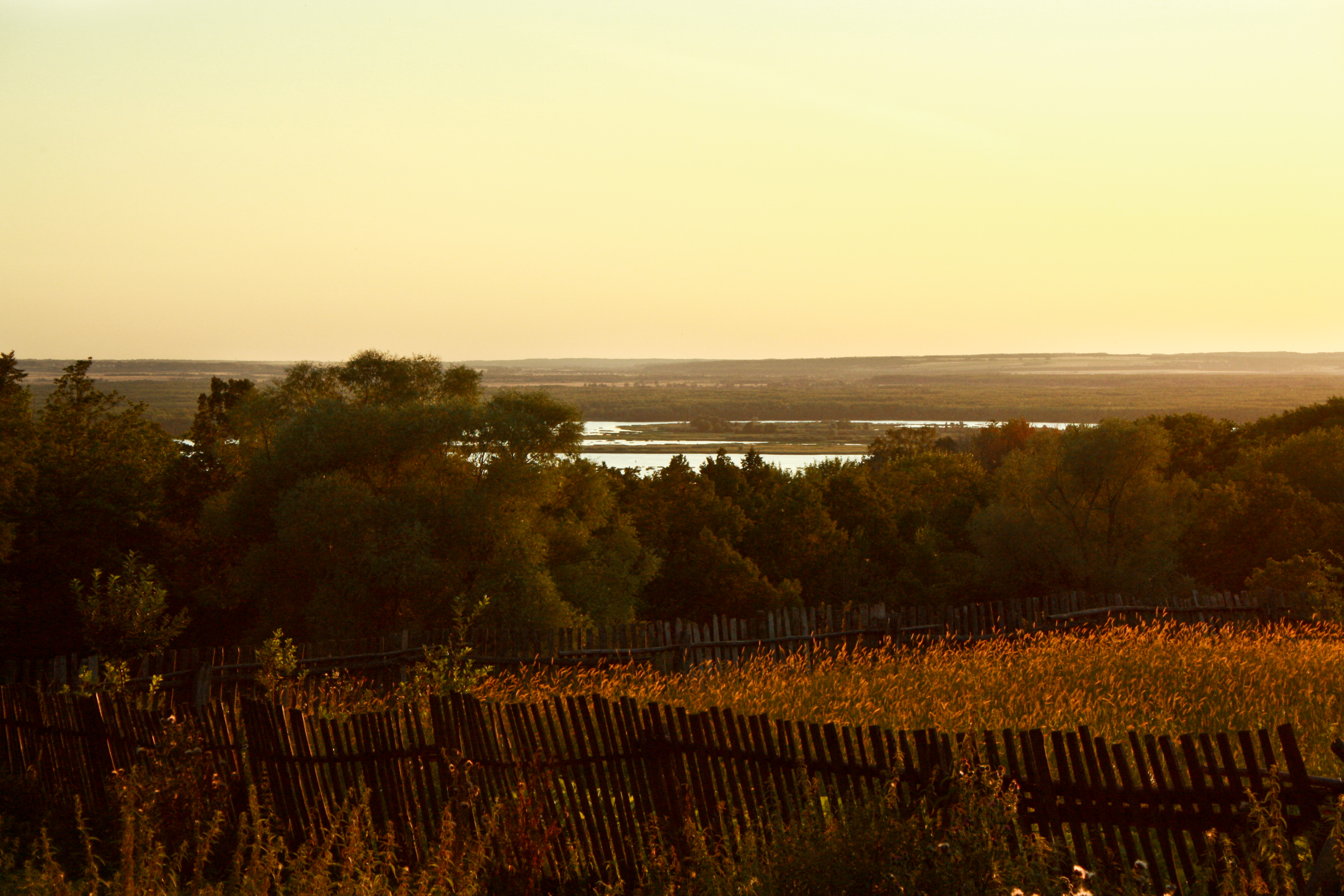 Панорама Новая Слобода, Марий Эл